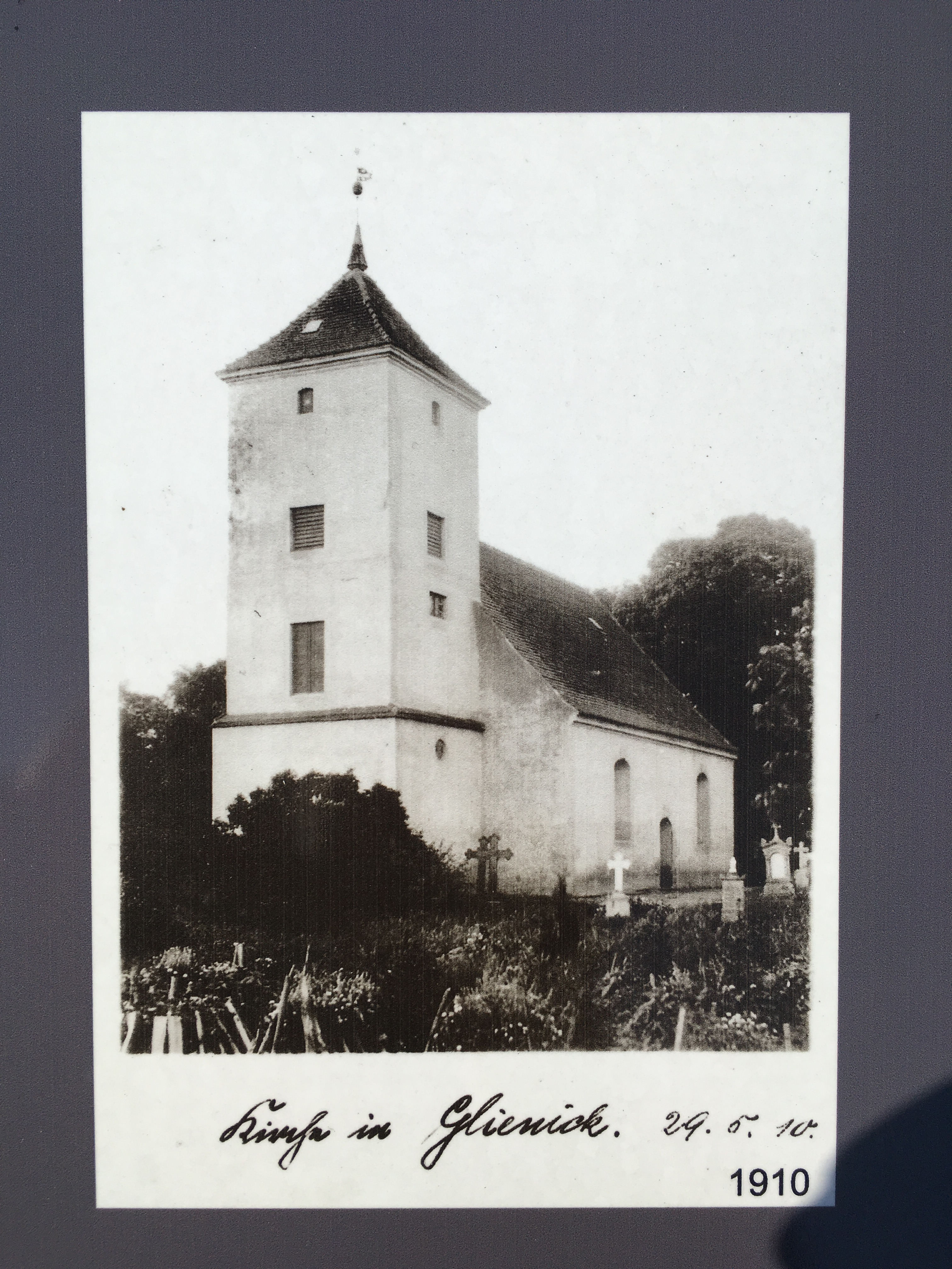 Das genaue Baudatum der Dorfkirche Glienick ist nicht genau bekannt. Experten gehen davon aus, dass es sich um einen spätmittelalterlichen Bau handelt, dessen Ostwand 1730 erneuert wurde. Im Innern befinden sich ein mit Schnitzwangen verzierter Kanzelaltar aus dem 18. Jahrhundert mit einem Gesprengten Giebel und eine hölzerne Fünte aus dem Jahr 1570.